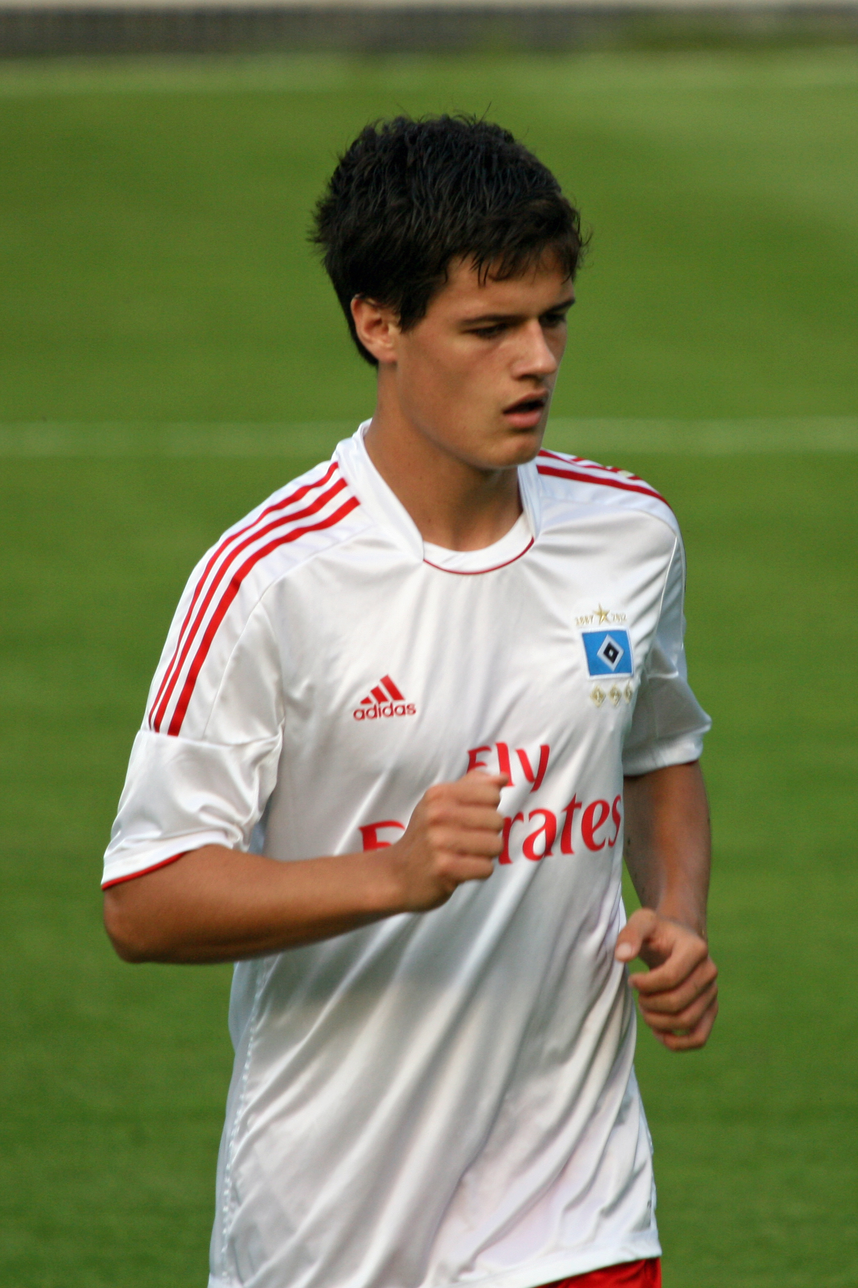 Der dänische Neuzugang Christian Nørgaard mit dem Hamburger HSV beim Saisonvorbereitungsspiel gegen Eintracht Norderstedt / Juli 2012